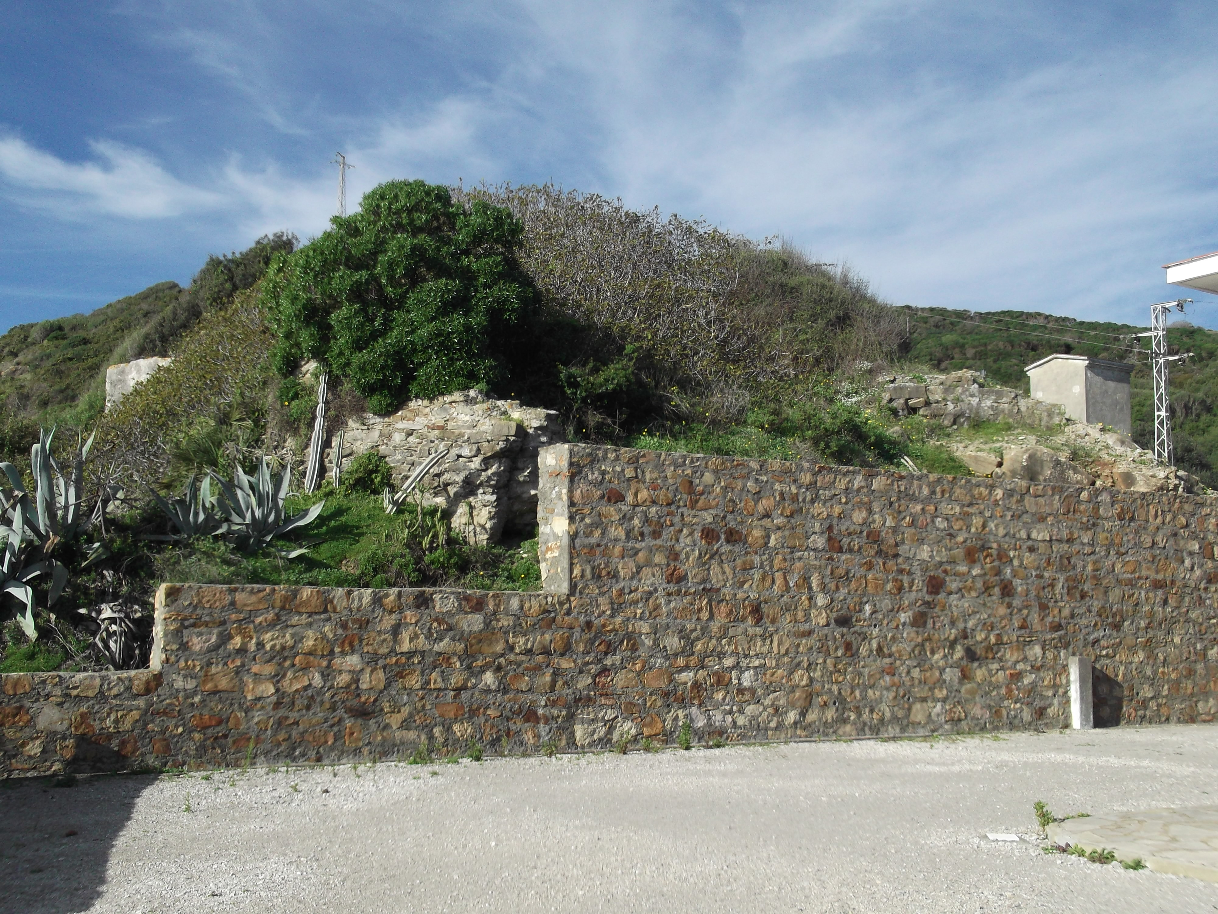 Restos del Fuerte de Punta Carnero junto al faro del mismo nombre. Algeciras, Andalucía, España